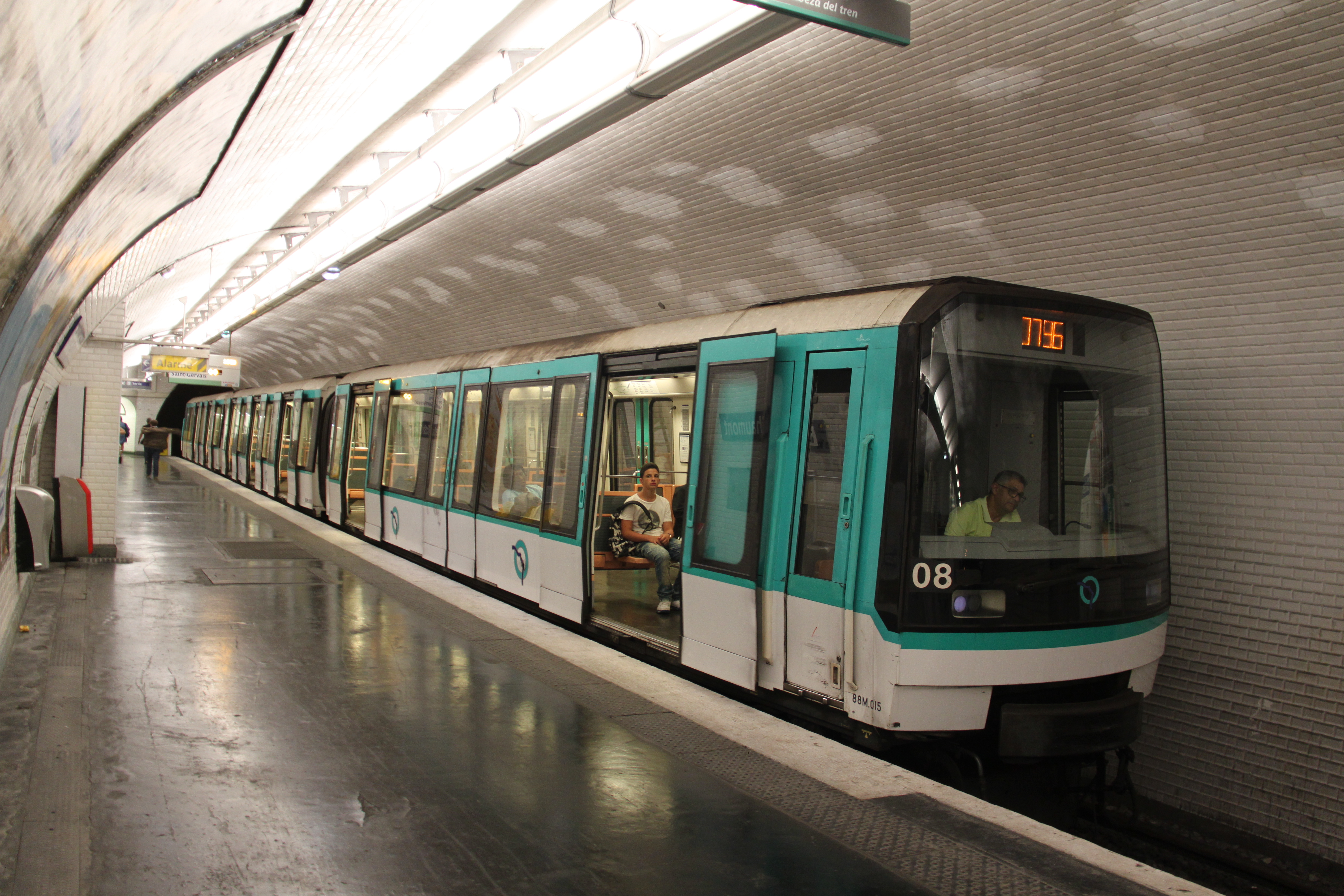 Metrostel MF 88 te Buttes Chaumont.